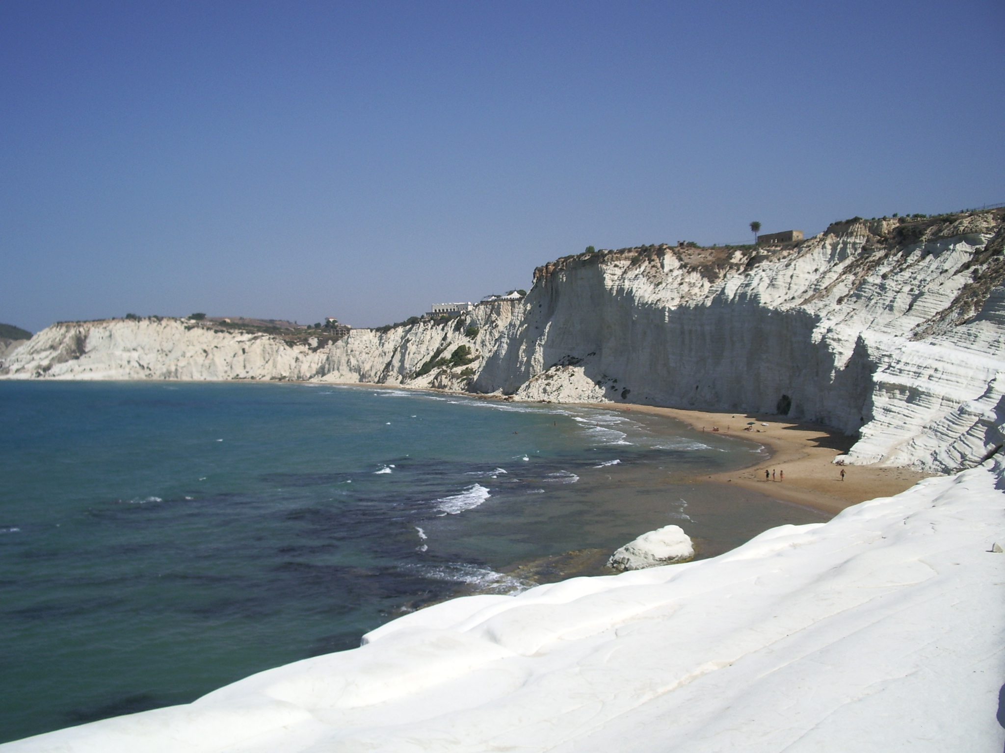 Scala dei turqui - Realmonte, Sicília